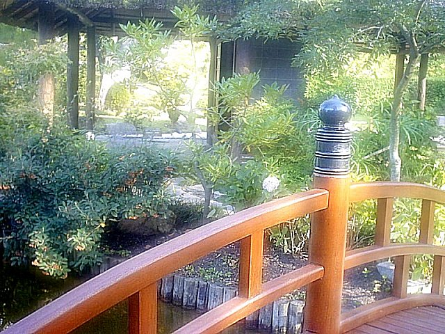 Descripción: Jardín Japonés en el Museo Blanes (Prado, Montevideo) Fuente: trabajo propio Fecha: 10/09/2006 Autor: NeMo